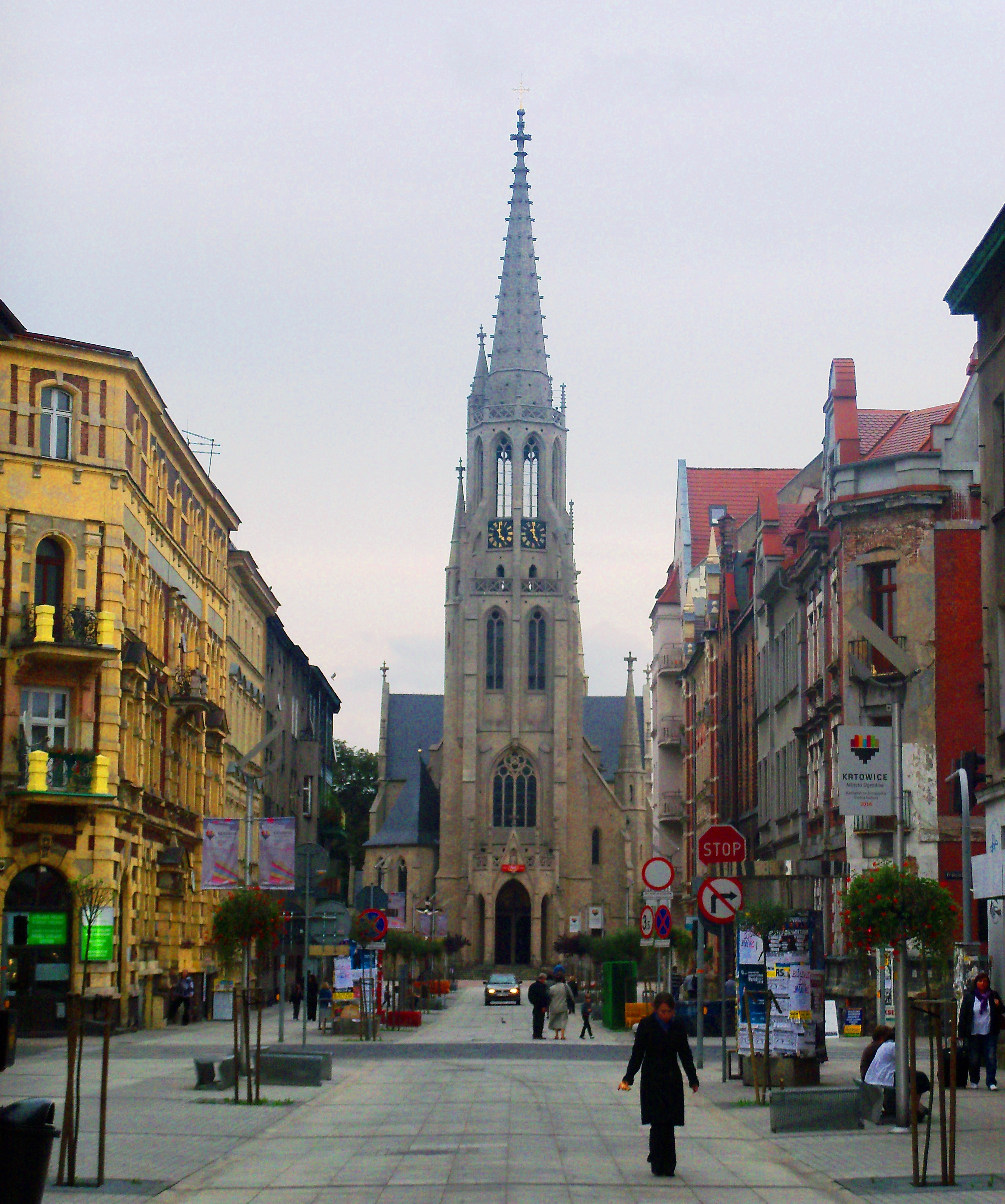 Kościół Mariacki w Katowicach